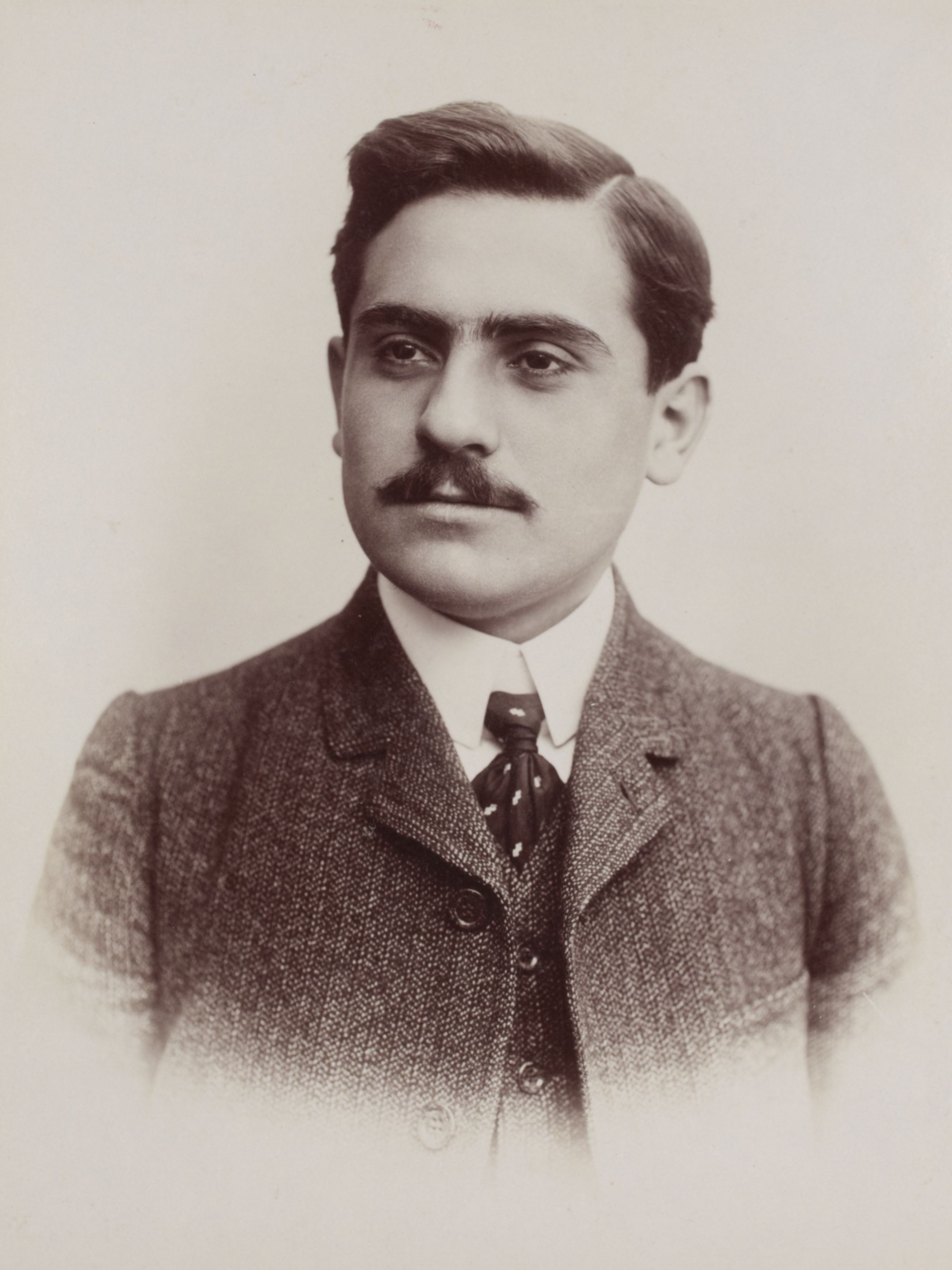 [Collection Jules Beau. Photographie sportive] : T. 21. Année 1903 / Jules Beau : F. 49v. Marcel Cadolle